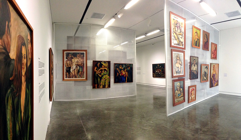 Exposición permanente. Artista Débora Arango.